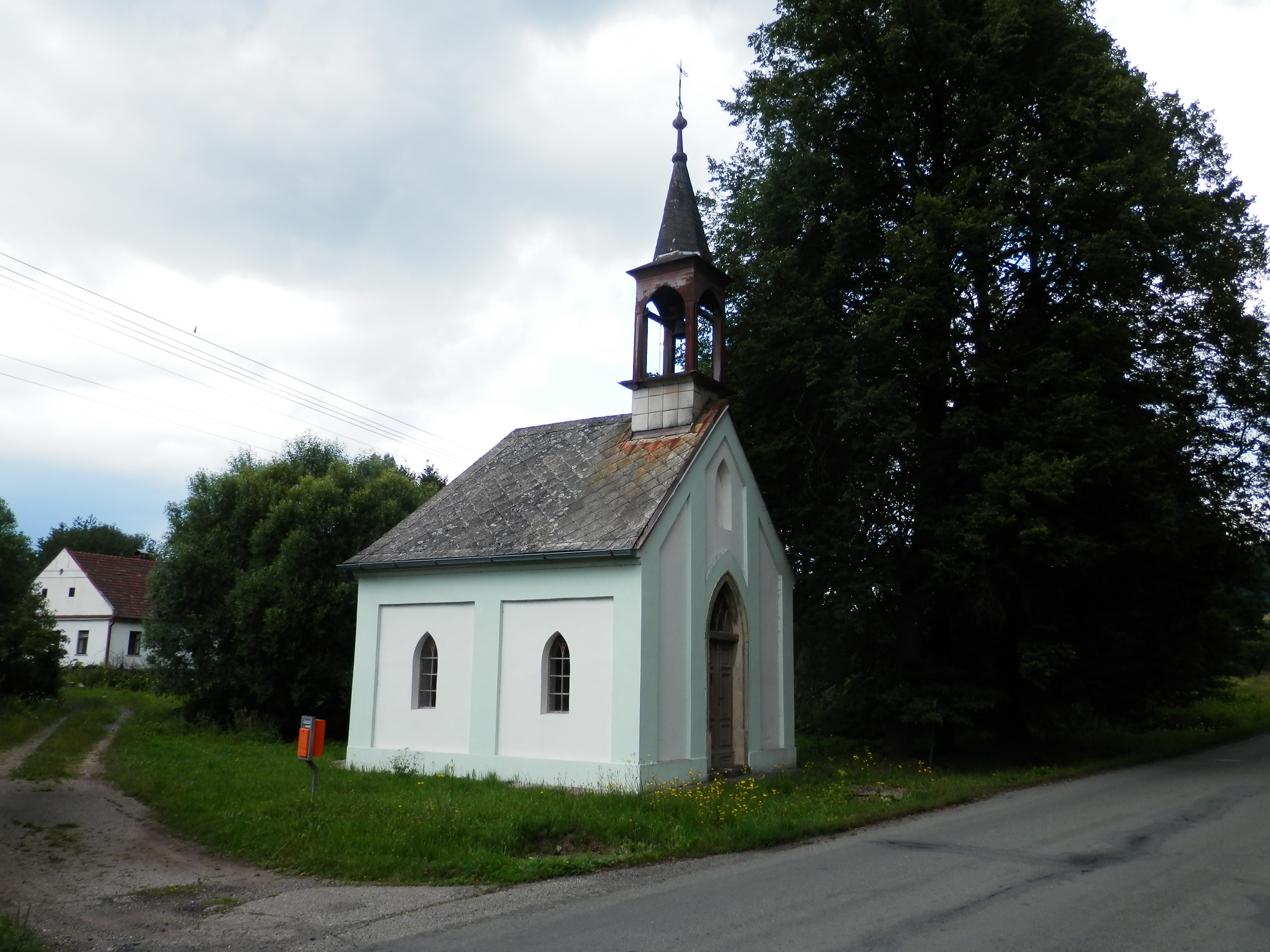 Šnekov